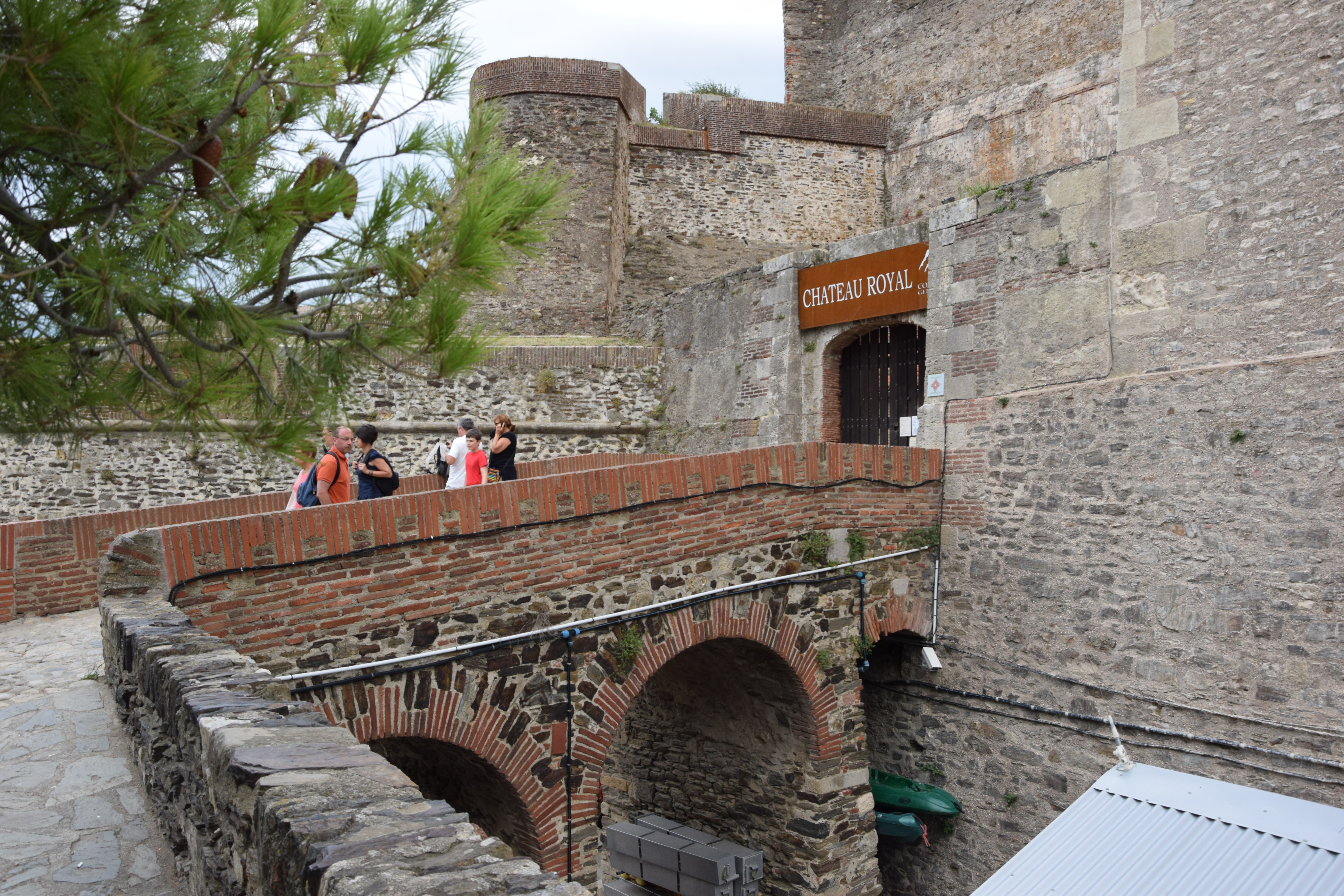 Château royal de Collioure